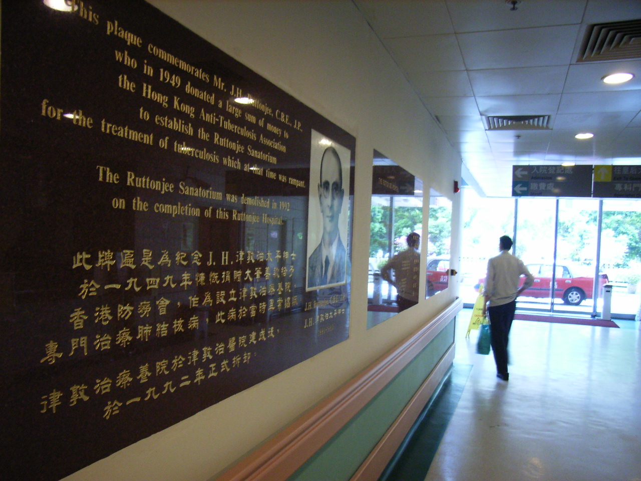 J.H. Ruttonjee CBE JP & 律敦治醫院 Ruttonjee Hospital BY RICHARD MARTIN.